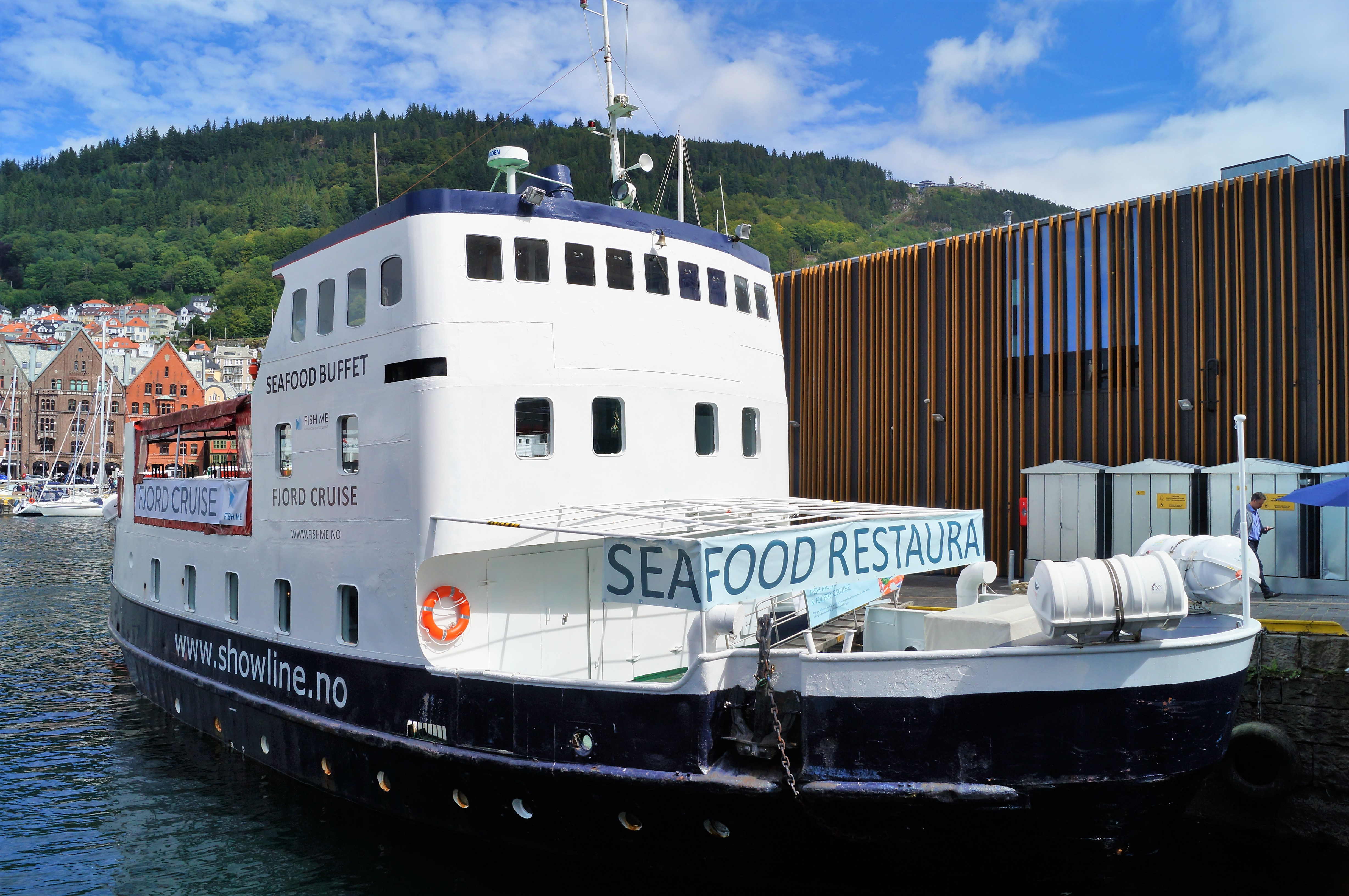 «Showboat» i Bergen